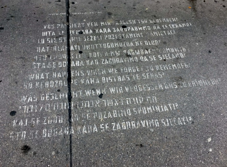 Asphaltinschrift vor der Gedenkstätte für die Opfer des österreichischen Freiheitskampfes, Wien, Salztorgasse 6